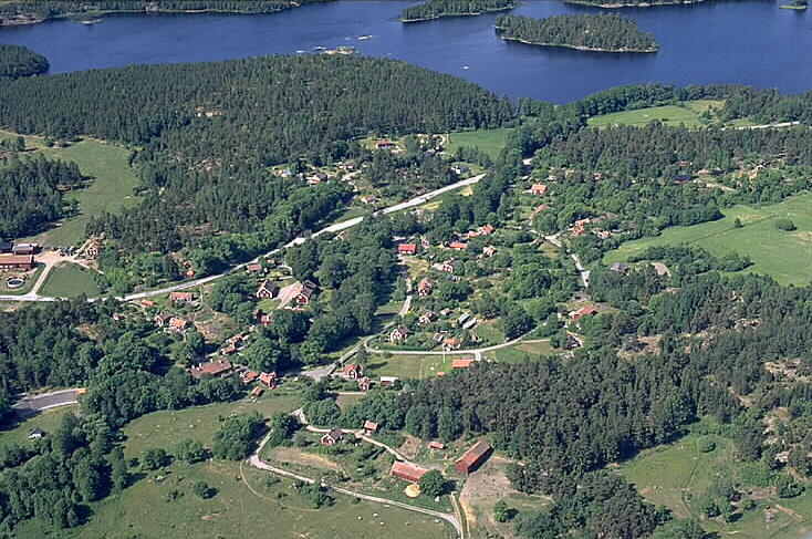 Motiv: Vira bruk Nyckelord: Flygbilder, Riksintressen Kategori: Bruksmiljö.